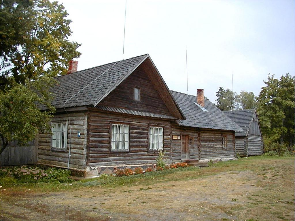 Kolnasāta - F. Trasuna muzejs Sakstagalā. 2002-09-14